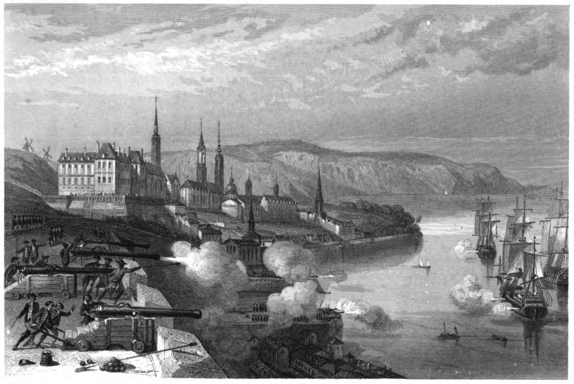 Defence of Quebec by Frontenac Défense de Québec, par Mr. de Frontenac, 1690.